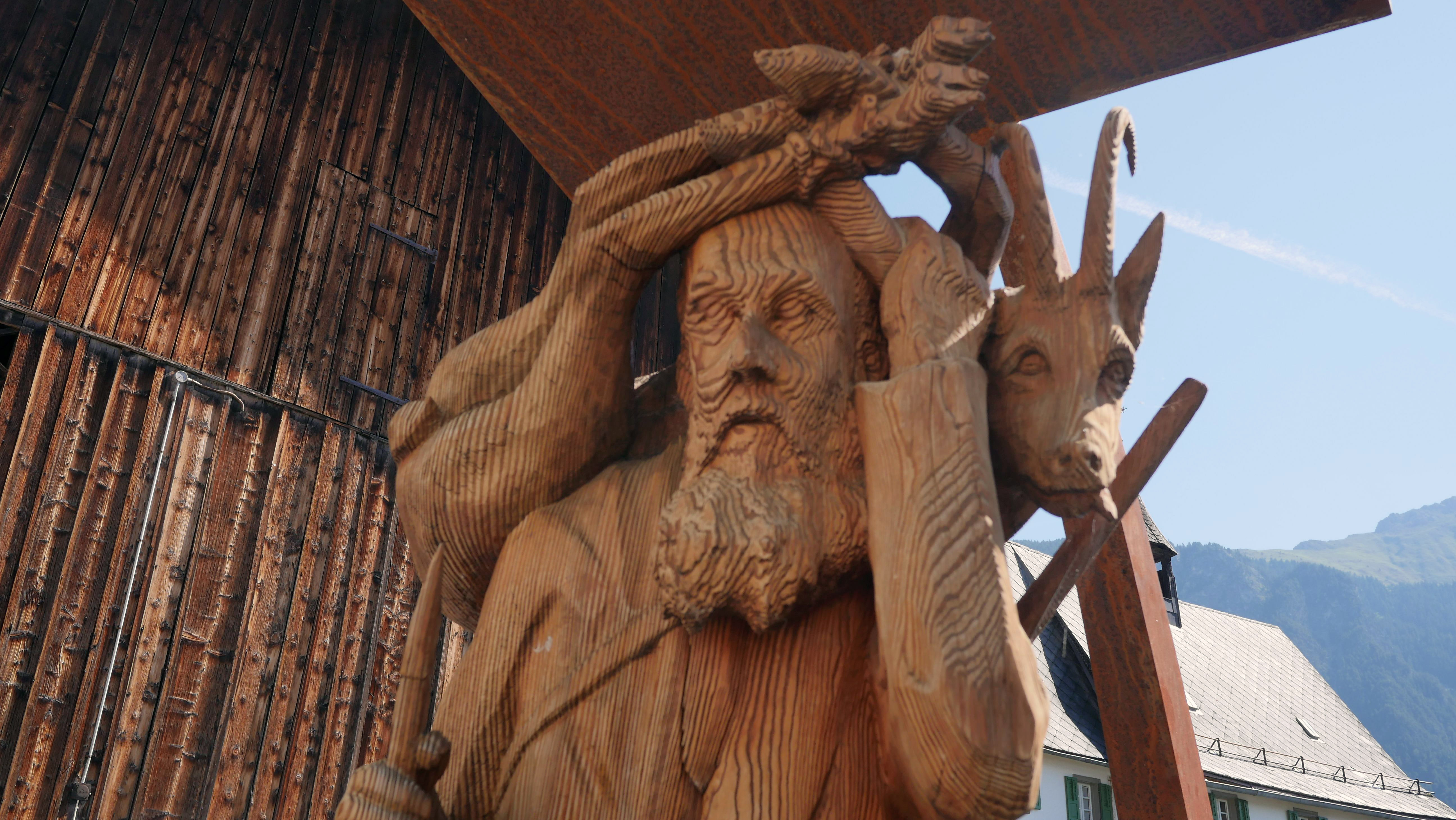 Holzskulptur für Pater Alexander Lozza (1880 - 1952) in Salouf (Detail)